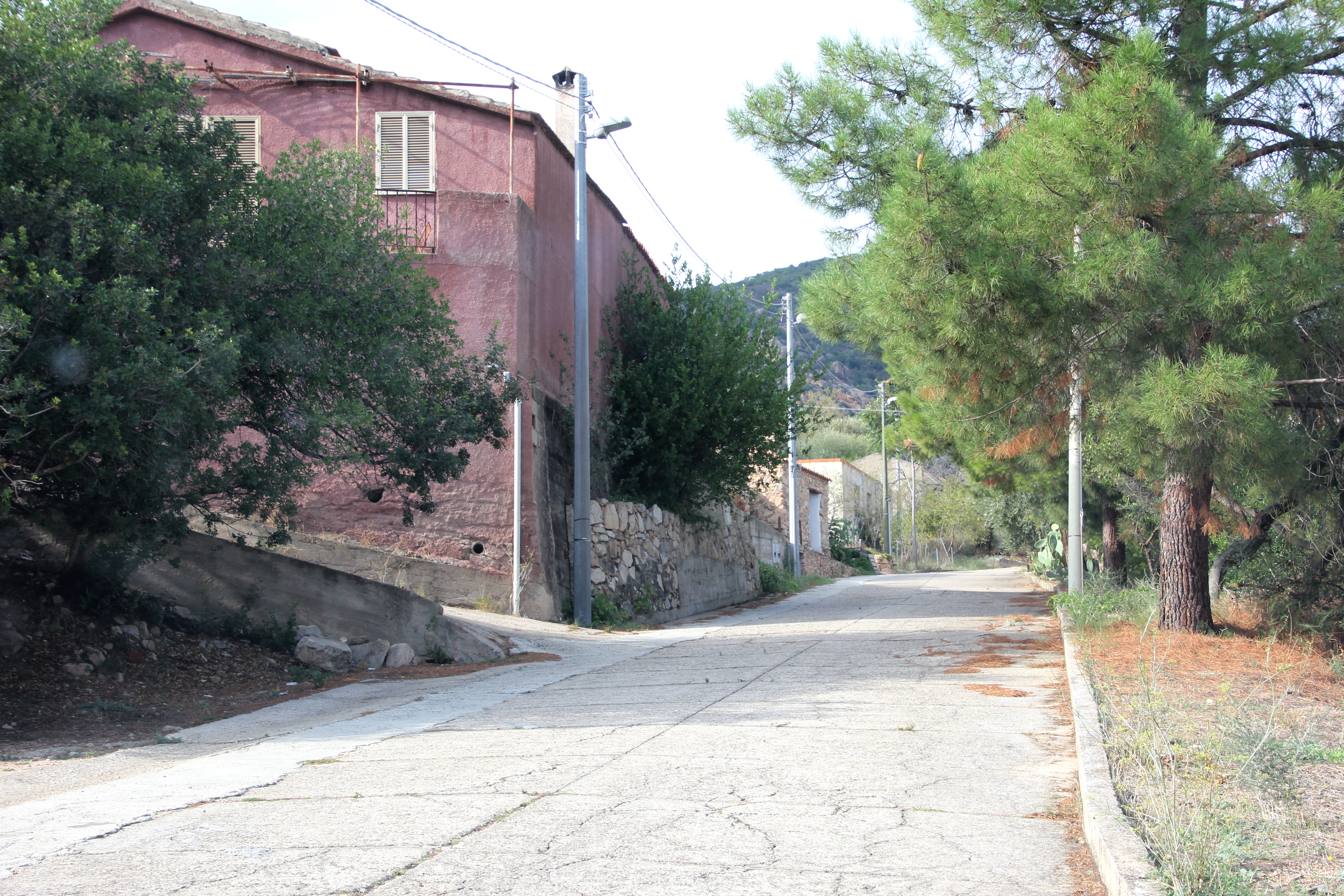 Torpè, frazione Concas